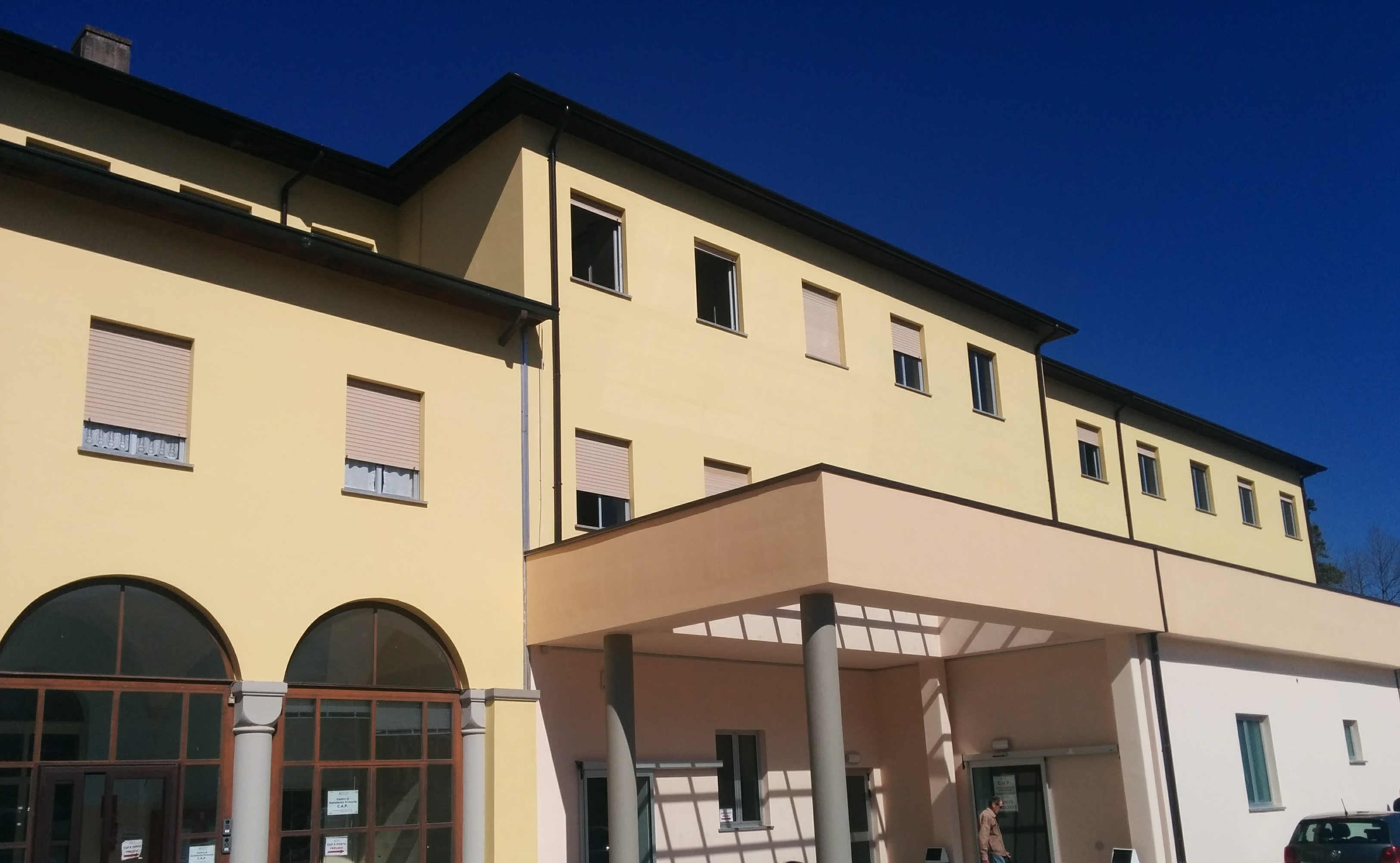 זהו המנזר שבו היה בית הילדים אשר קיום הוא בית חולים של העיר אבילאינה